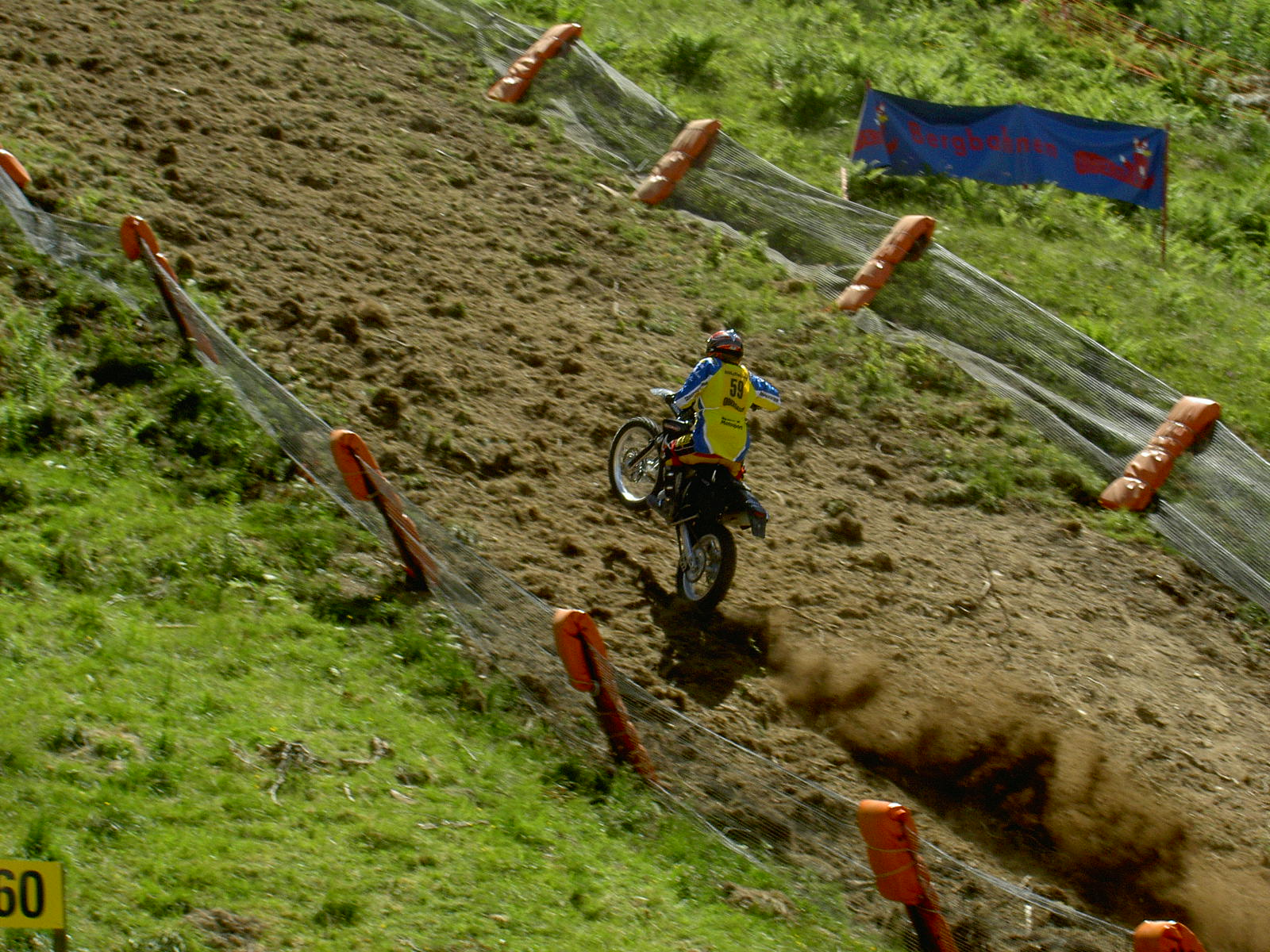 Hillclimbing 2003 in Obersaxen (Schweiz)